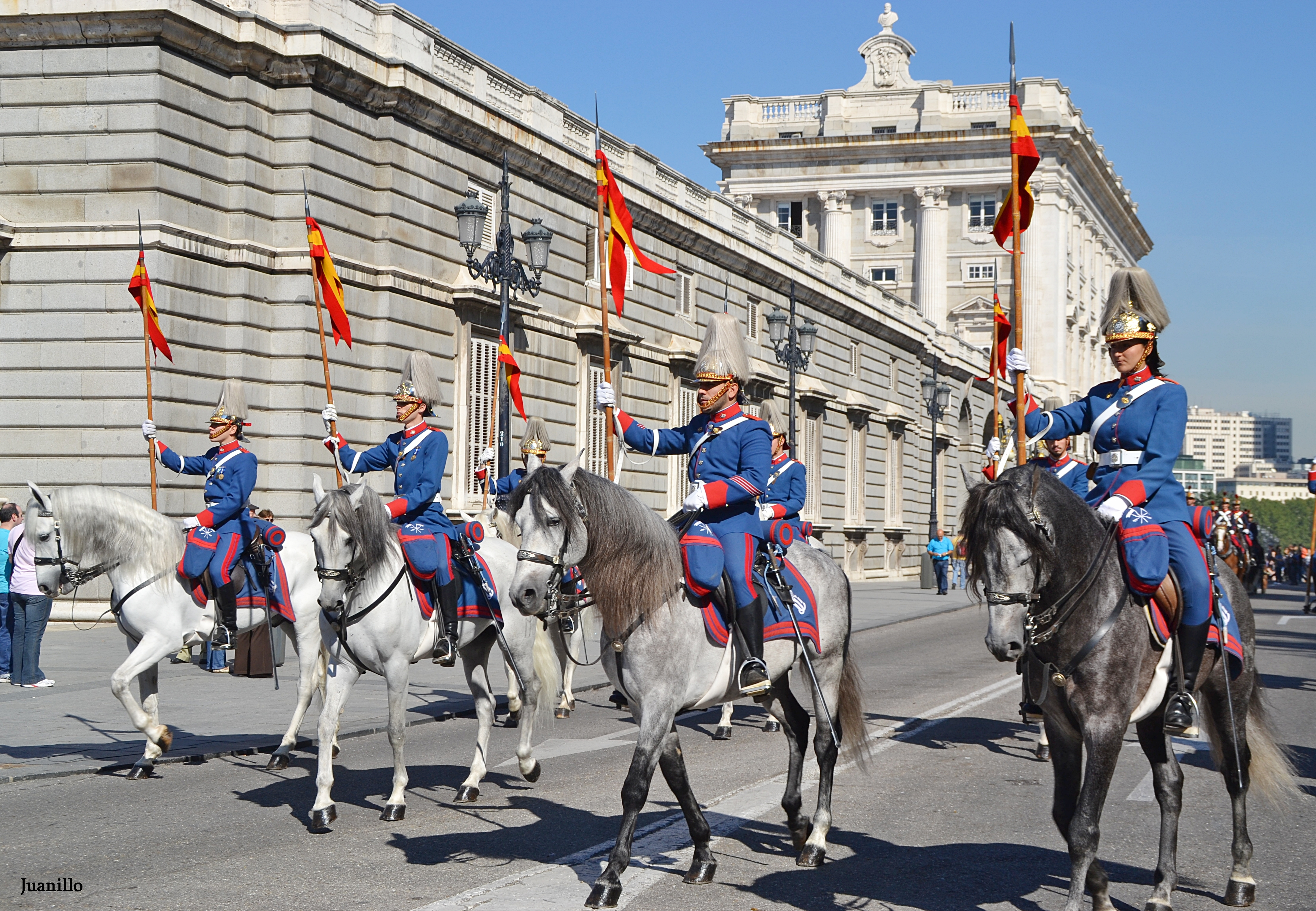 Lanceros del EER con lanza de coligüe.